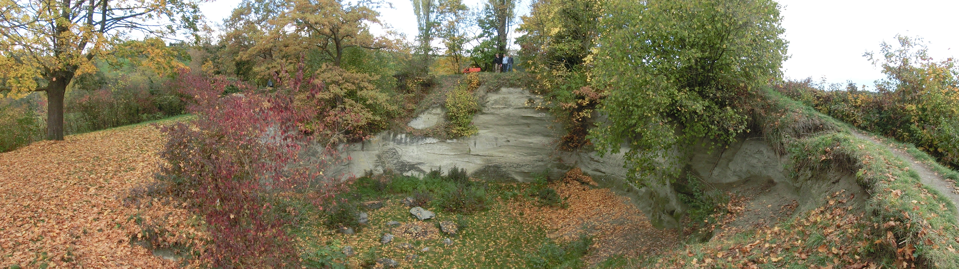 Deutschland - Baden-Württemberg - Überlingen: Blick in die Gletschermühle